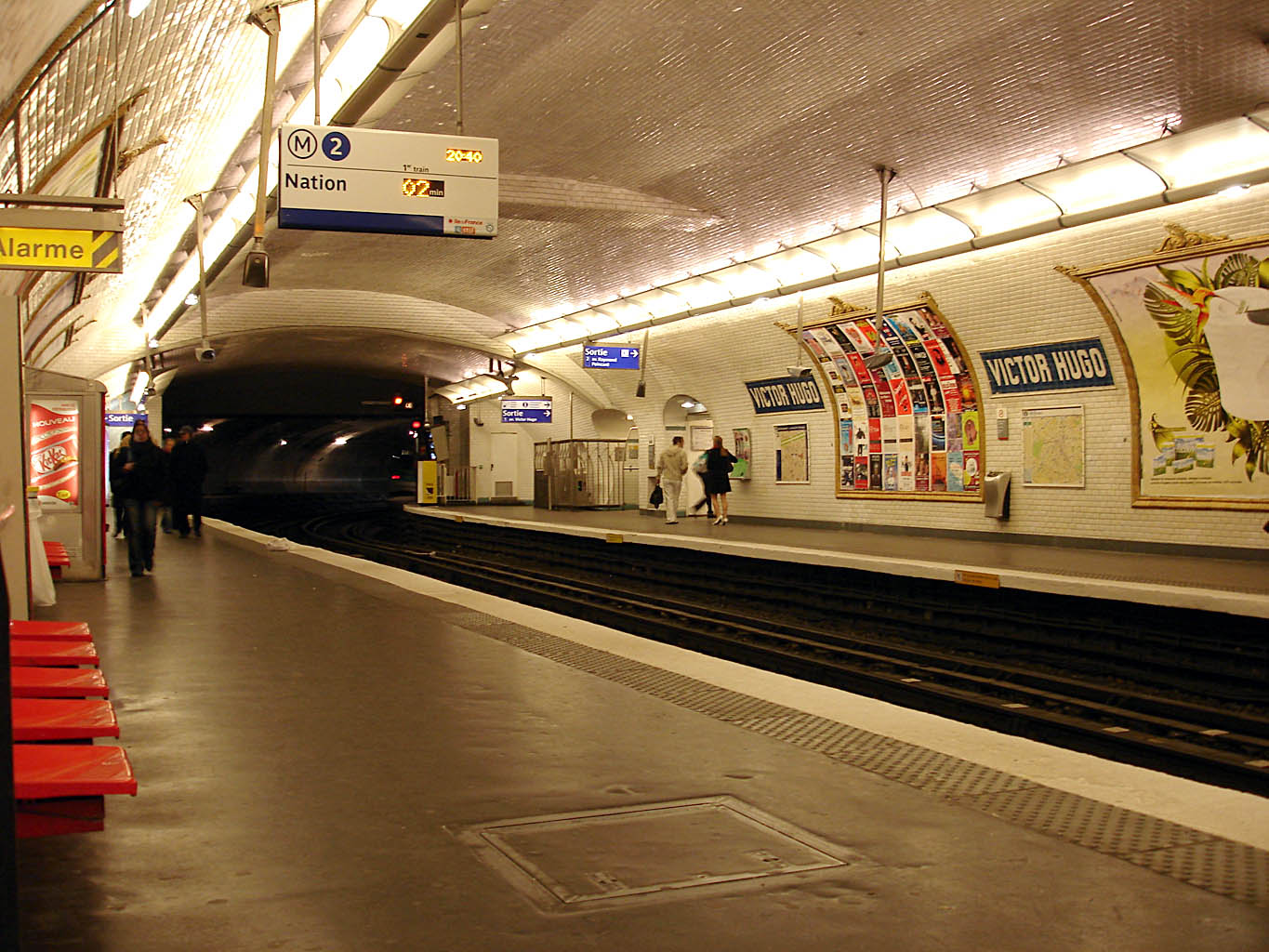 Station Victor Hugo de la ligne 2 du métro de Paris, France.